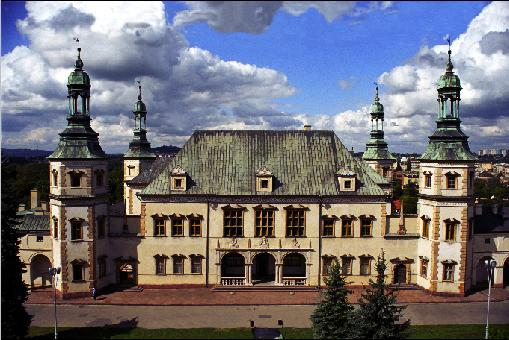 Muzeum Narodowe w Kielcach, Dawny Pałac Biskupów Krakowskich.